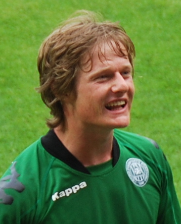 Fodboldspilleren Mads Hvilsom fra Viborg FF. Her efter 1. divisionskampen mod FC Roskilde på Viborg Stadion.